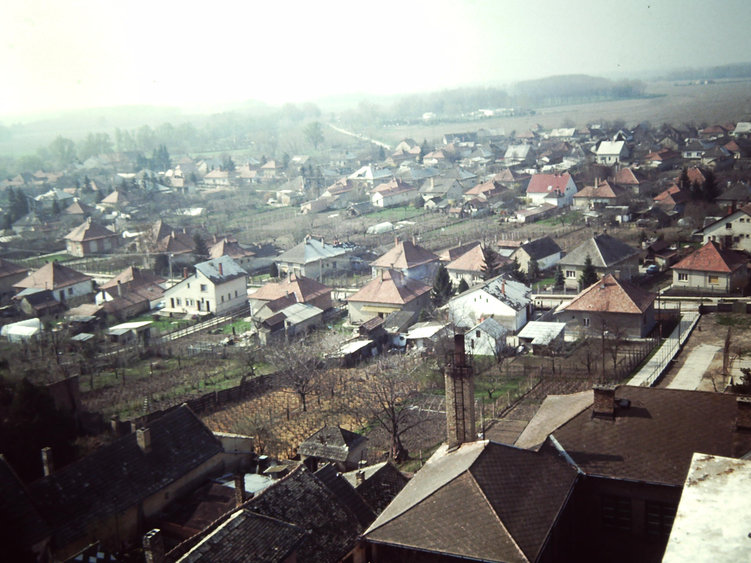 Blick vom Kirchturm auf Tolna